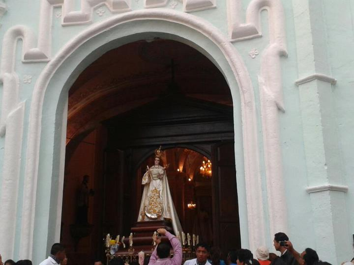 Templo de la candelaria, Al frente de ella la santisima virgen de la Candelaria